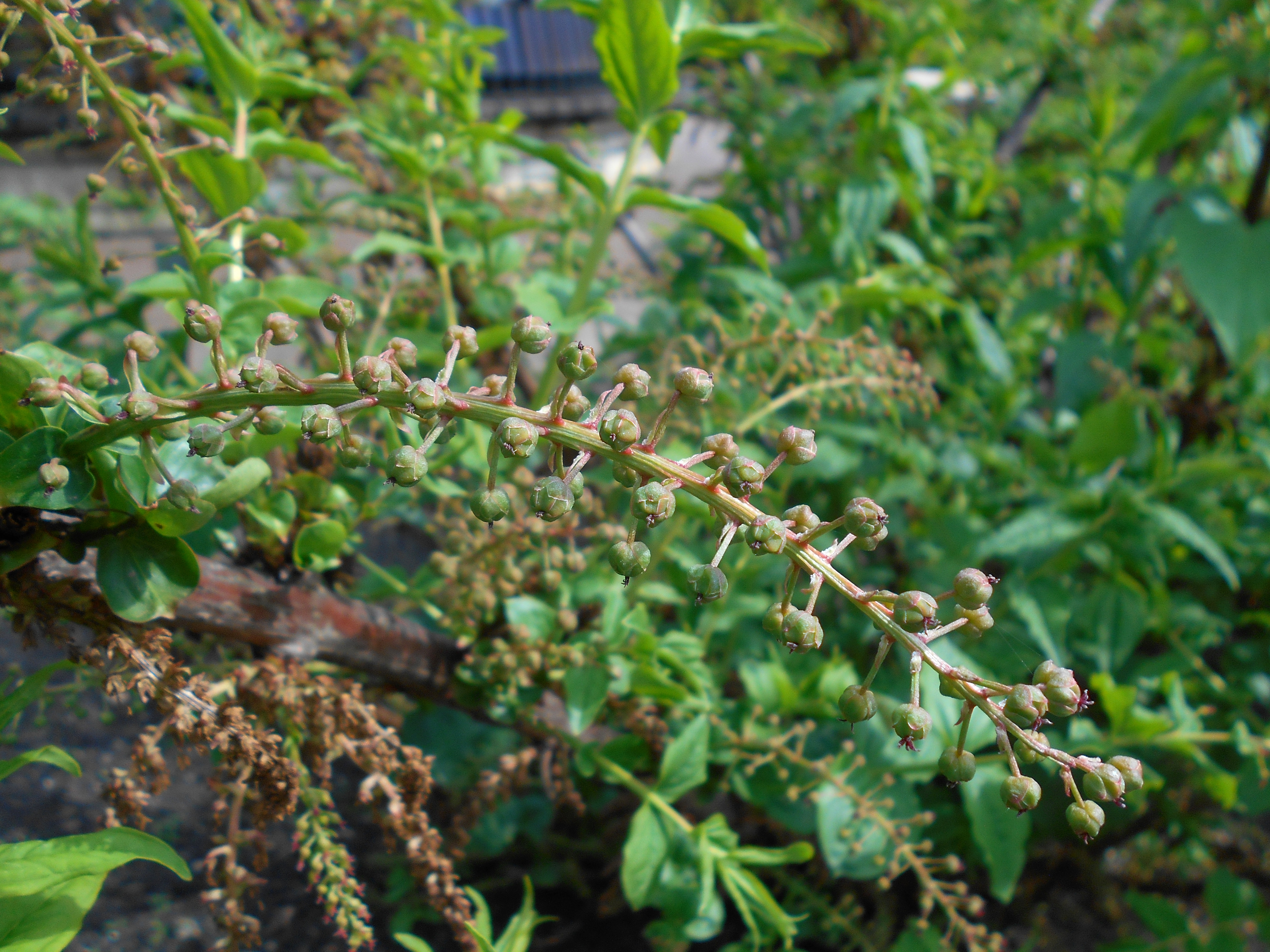 Coriaria nepalensis, Botanischer Garten Berlin.